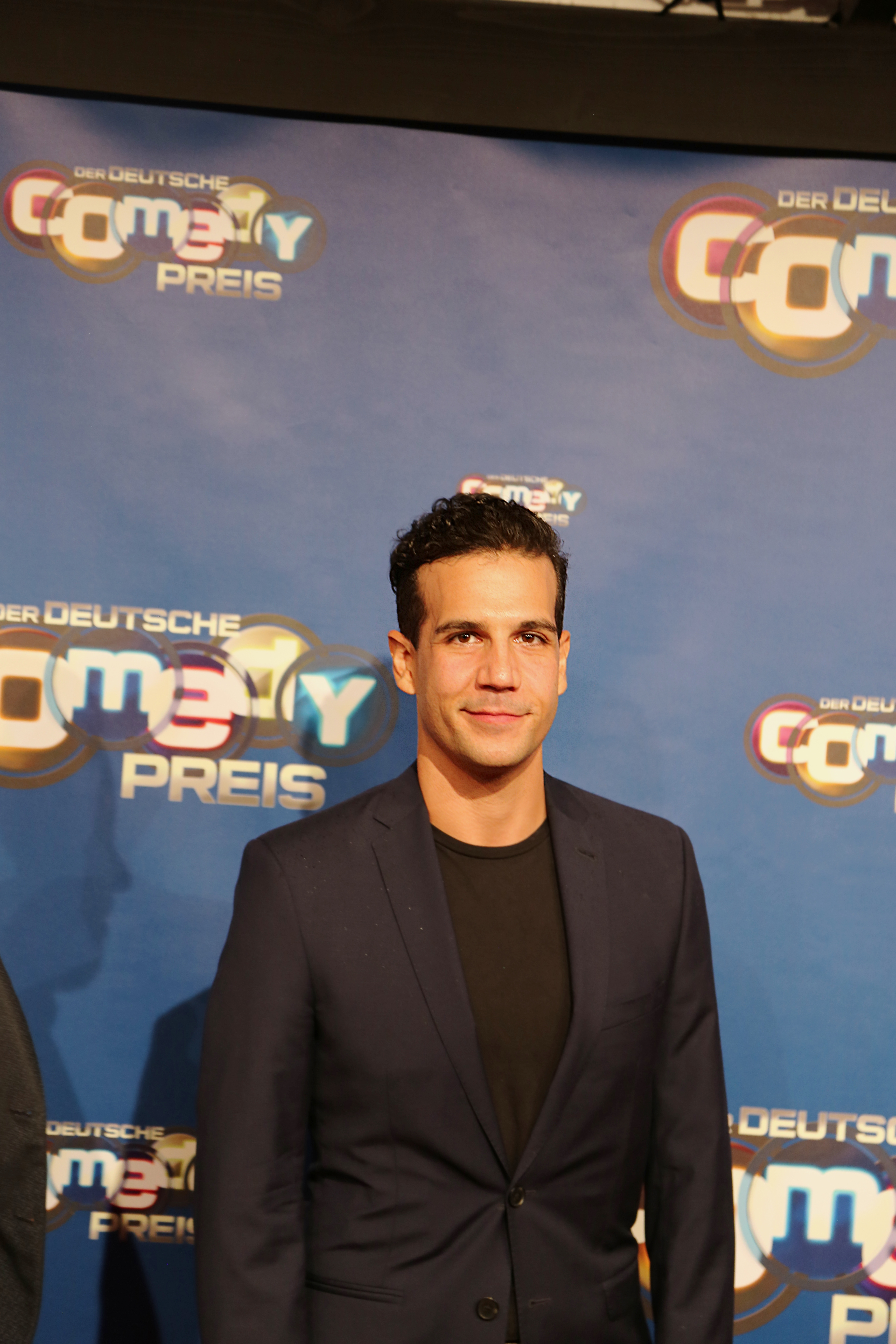 Daniele Rizzo beim Deutschen Comedypreis 2017.